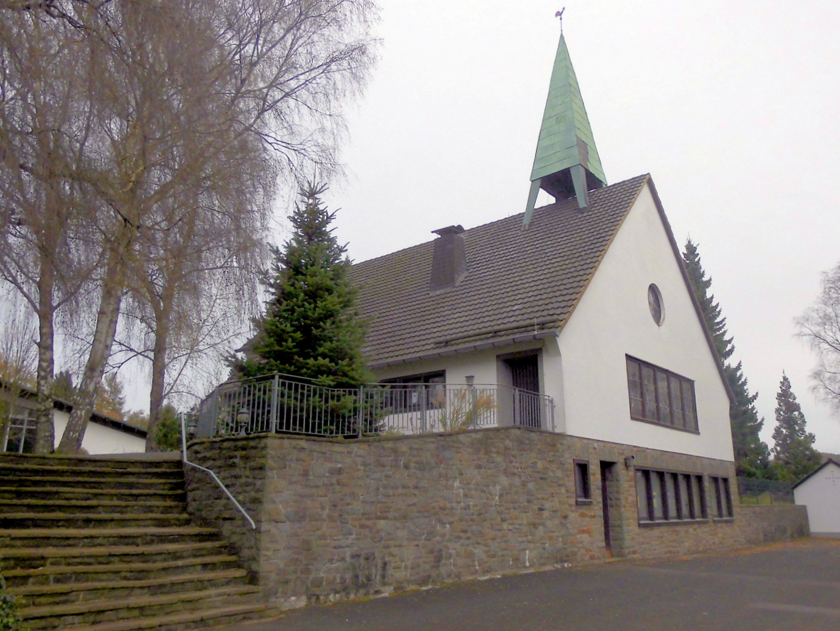 evangelische Kirche in Berkenroth, Gemeinde Nümbrecht, Deutschland